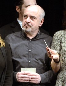 Matej Landl